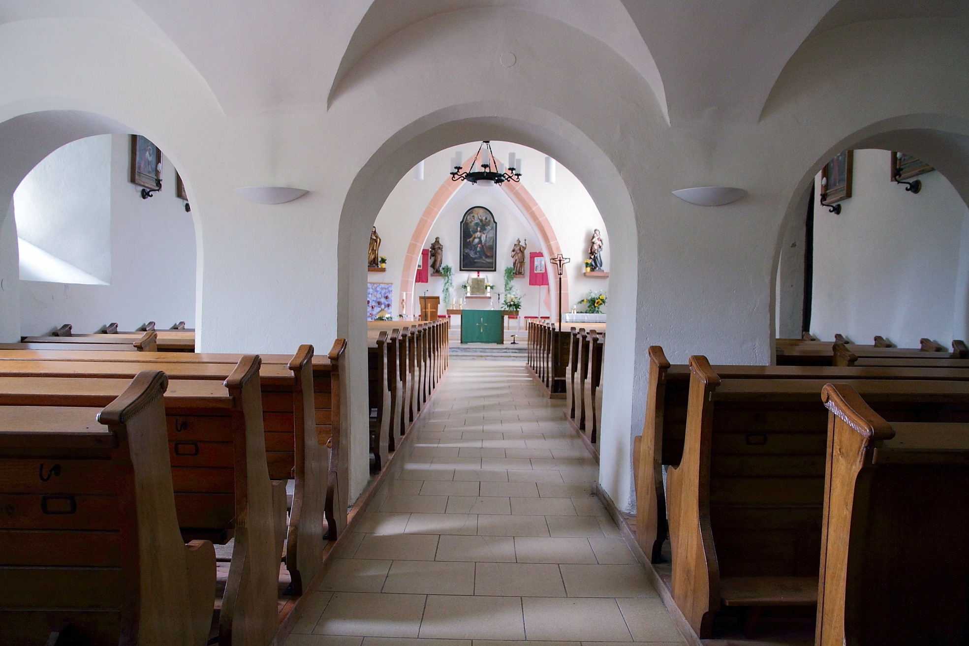 Innenansicht der katholischen Pfarrkirche hl. Katharina in der niederösterreichischen Gemeinde Eschenau.